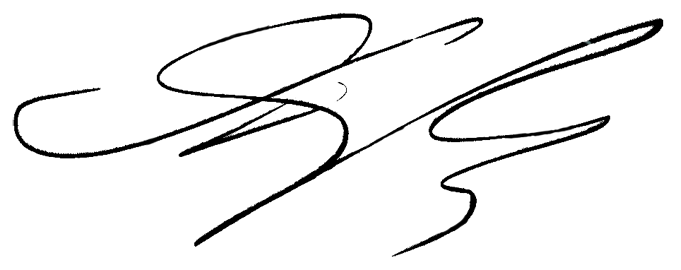 Автограф Джохара Дудаева